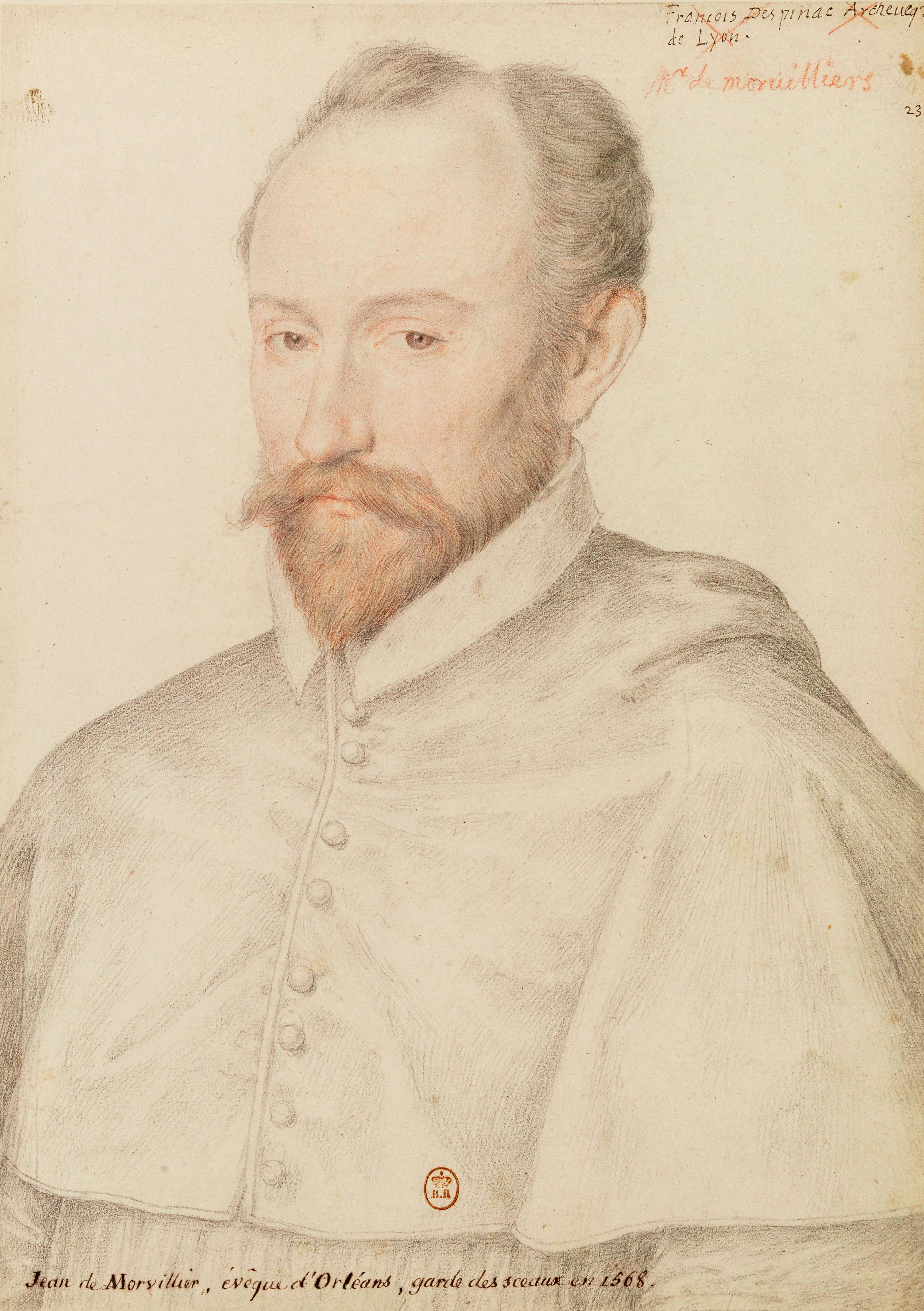 Pierre d'Épinac, archevêque de Lyon. L'identification erronée Jean de Morvillier, évêque d'Orléans, garde des sceaux en 1568 est inscrite en bas du dessin.